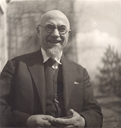 Josef Drahoňovský (1877 - 1938), Český sochař a glyptik.